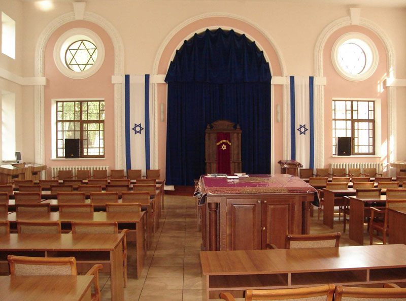 Молитвенный зал Галицкой синагоги